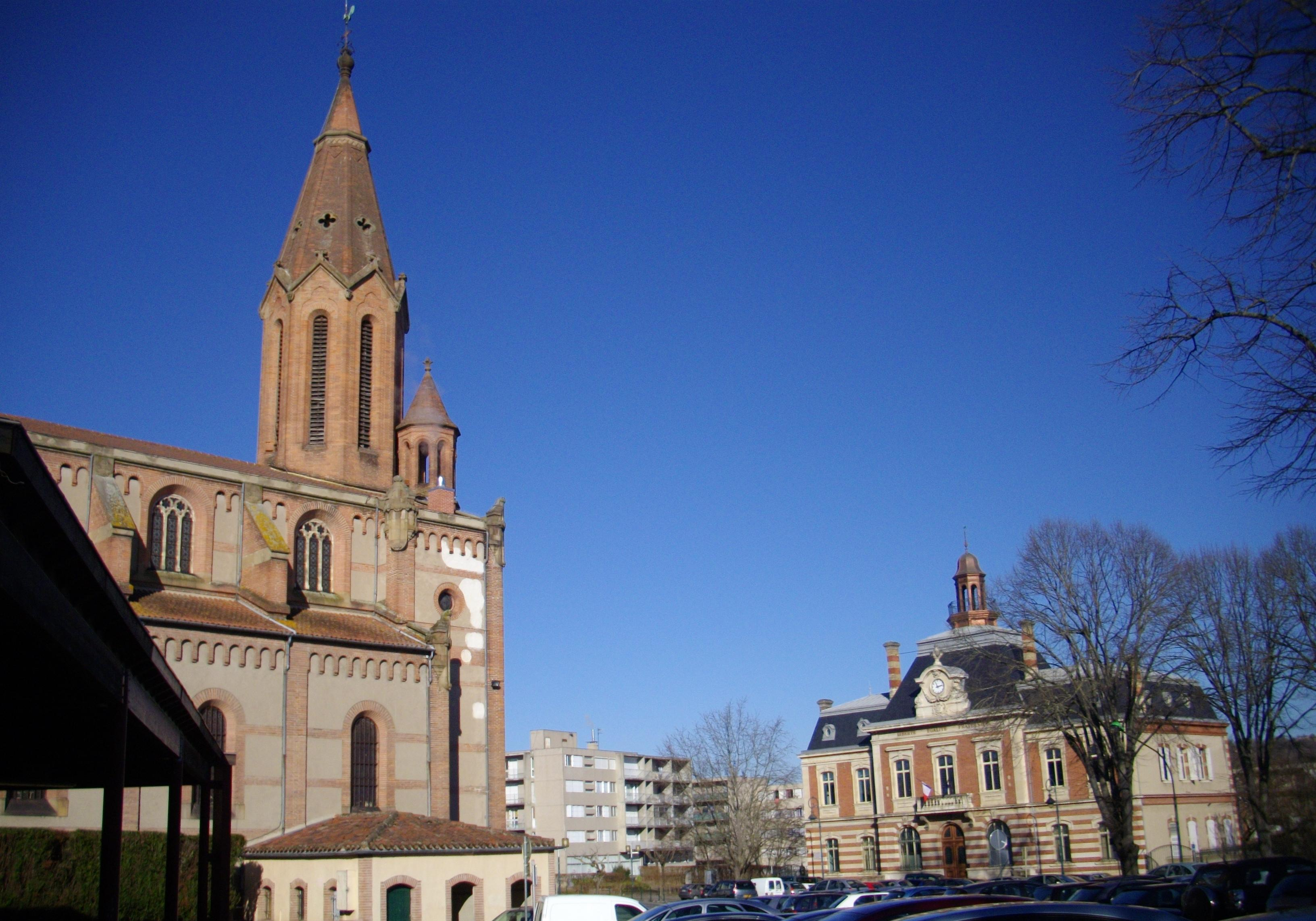 Hôtel de ville (1906) et Paroisse Saint-Privat (1865) - Carmaux